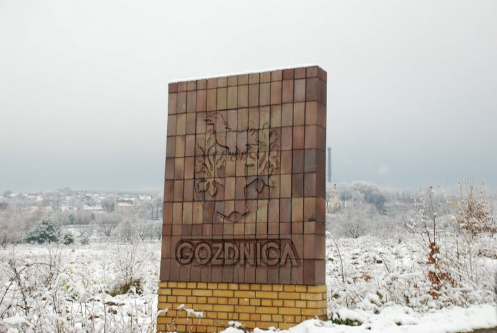 Panorama Gozdnicy z herbem